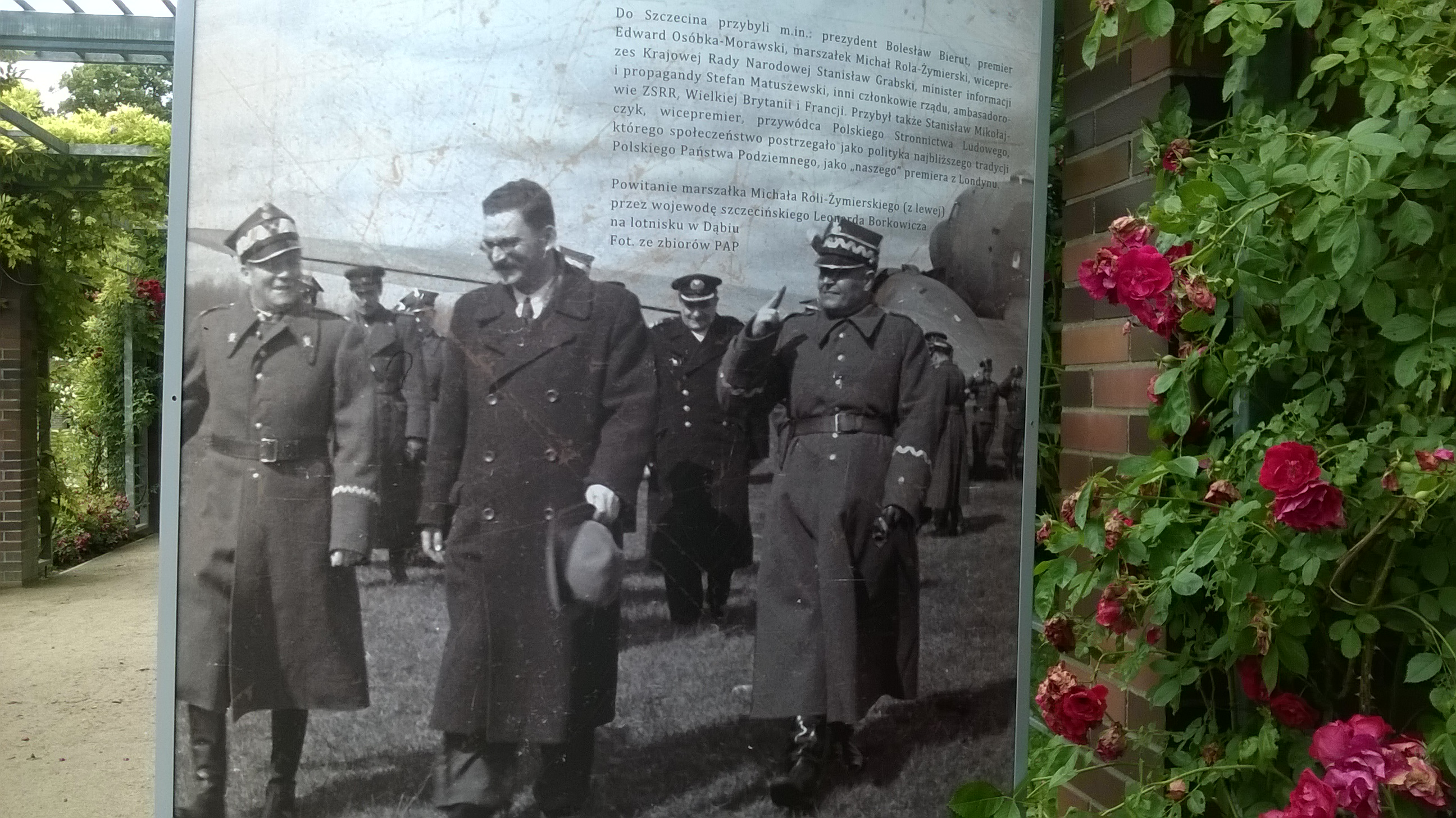 Wystawa historycznych fotografii w Ogrodzie Różanym w Szczecinie